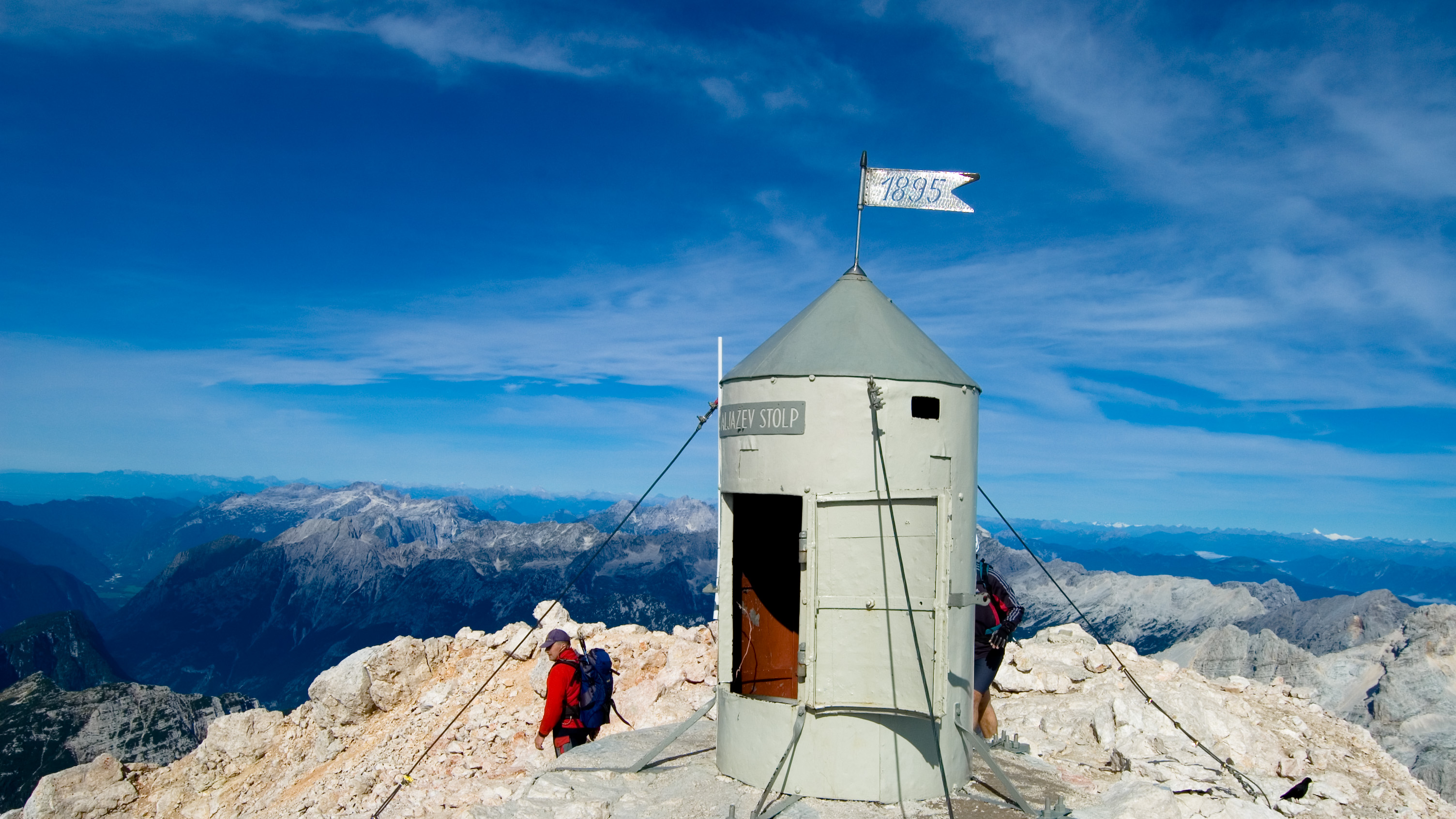 Triglav